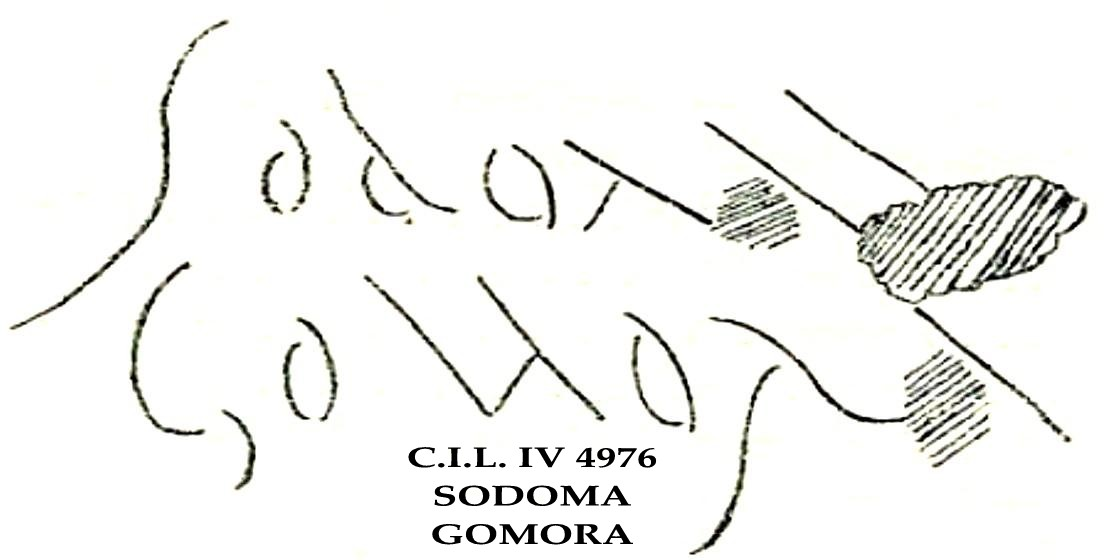 Inscripción pompeyana